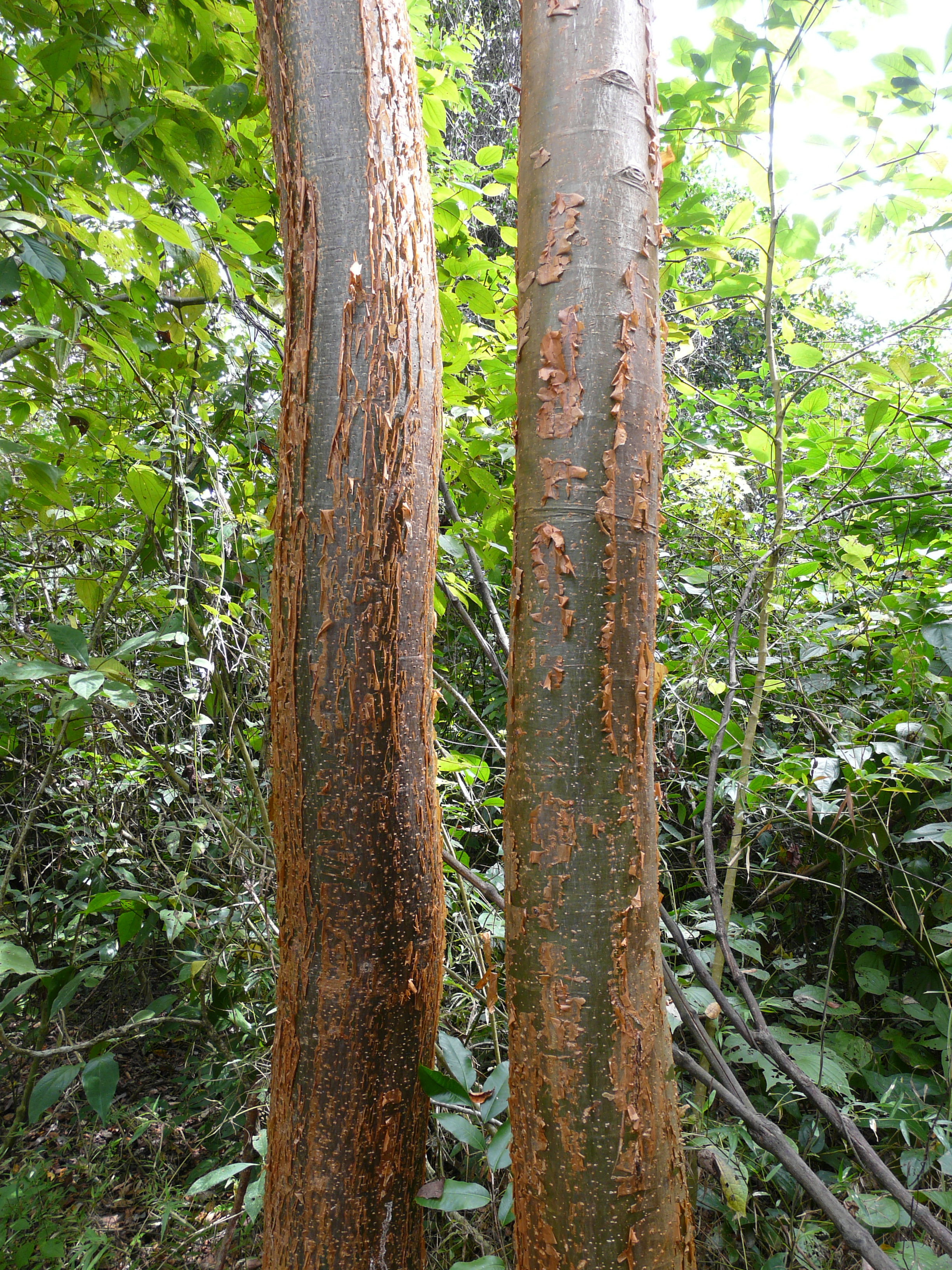 Kummibursera (Bursera simaruba). Topoxté, Guatemala.